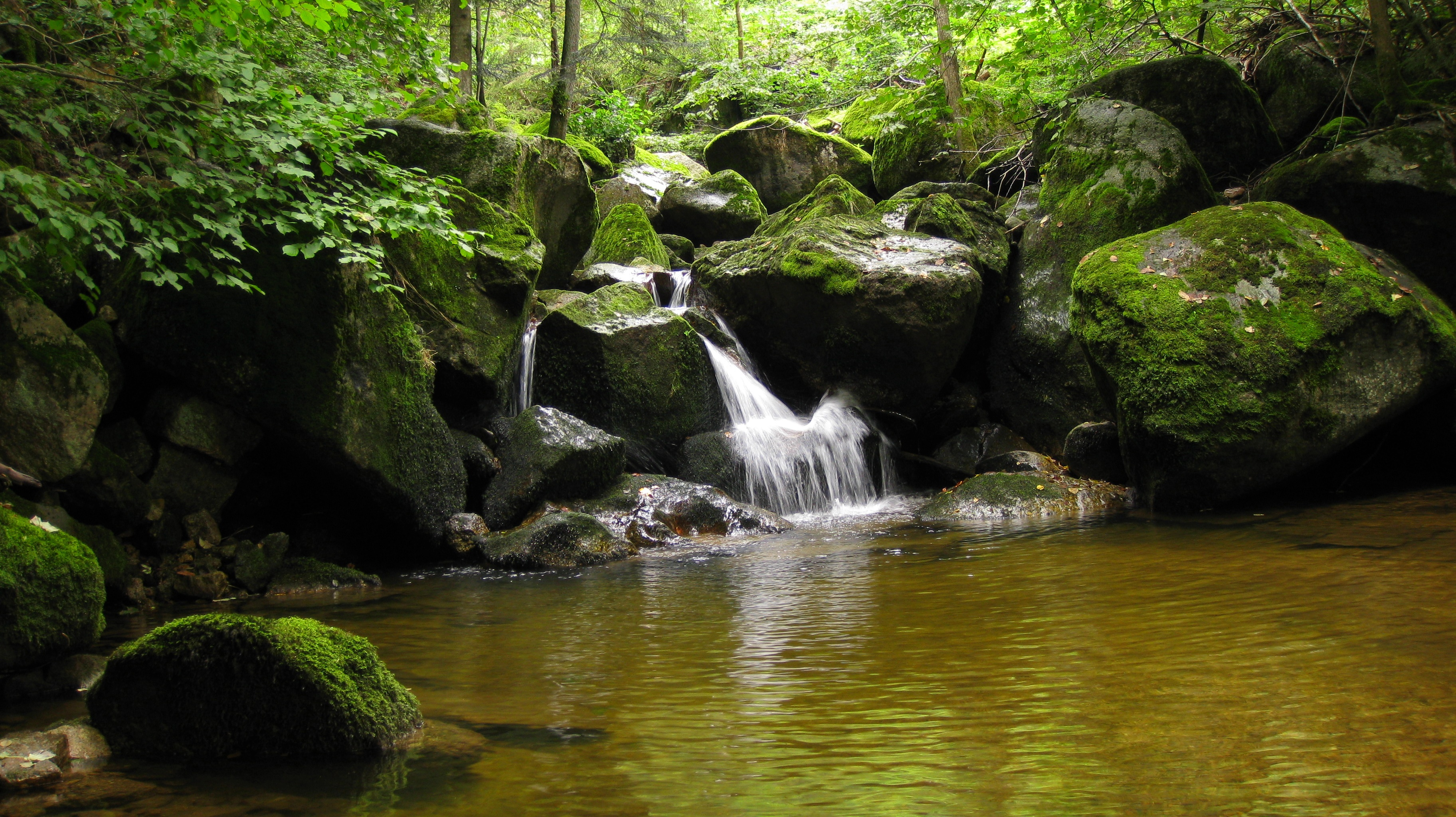 Wasserfall in der Stillensteinklamm bei Grein/Donau